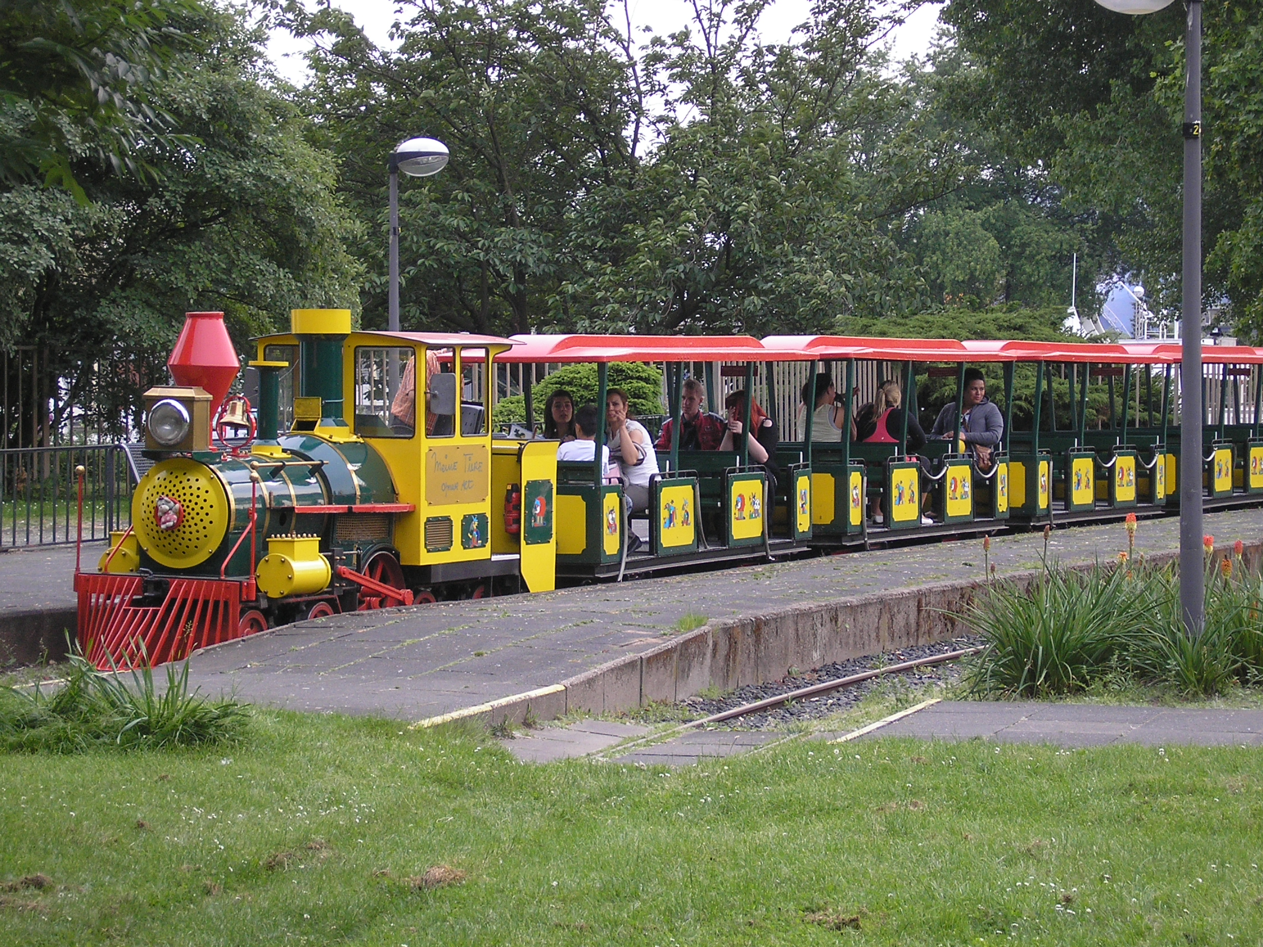 Rheinparkbahn im Rheinpark in Köln-Deutz.